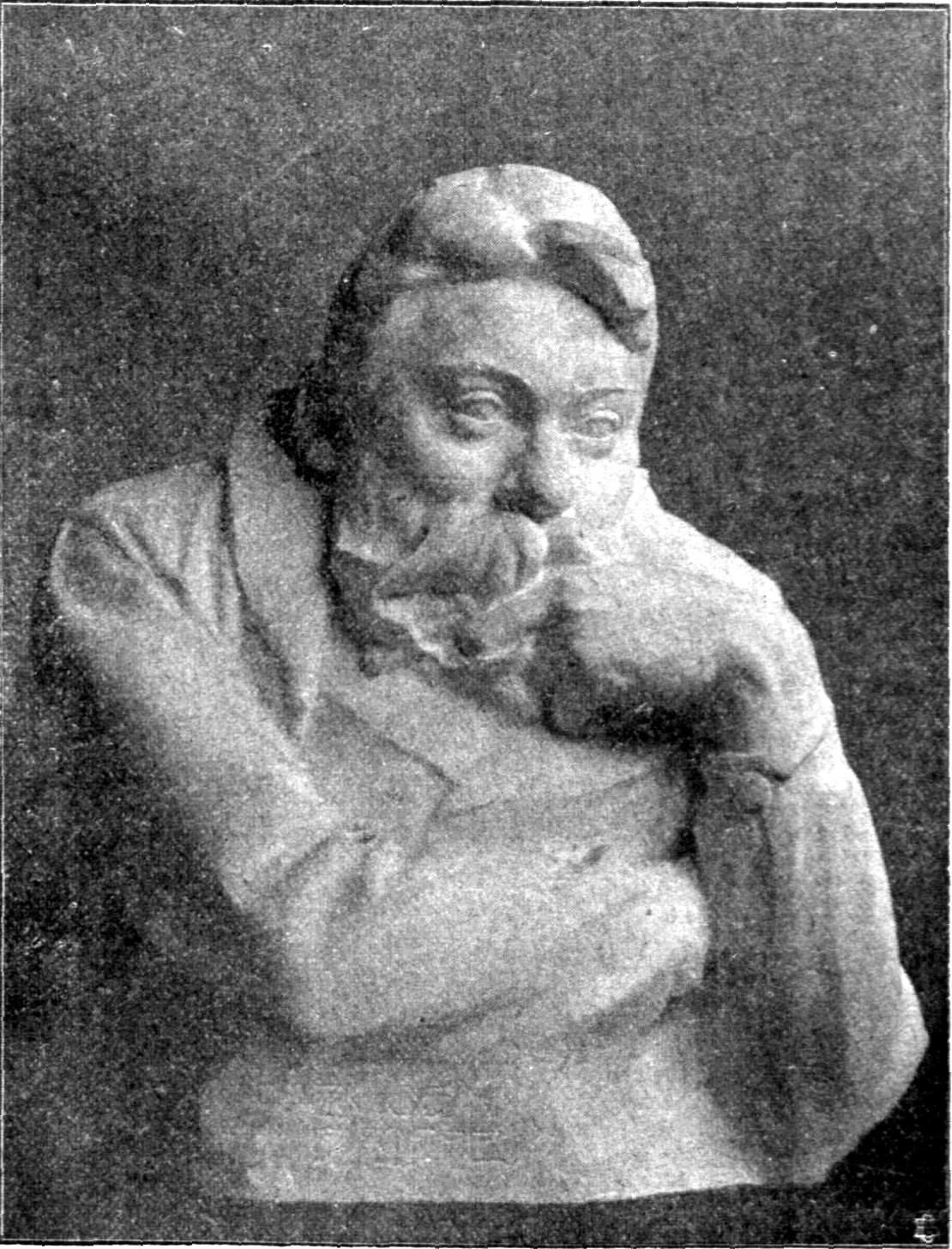 Hermann Joachim Pagels - Büste des Bildhauers Eugen Drippe, 1907